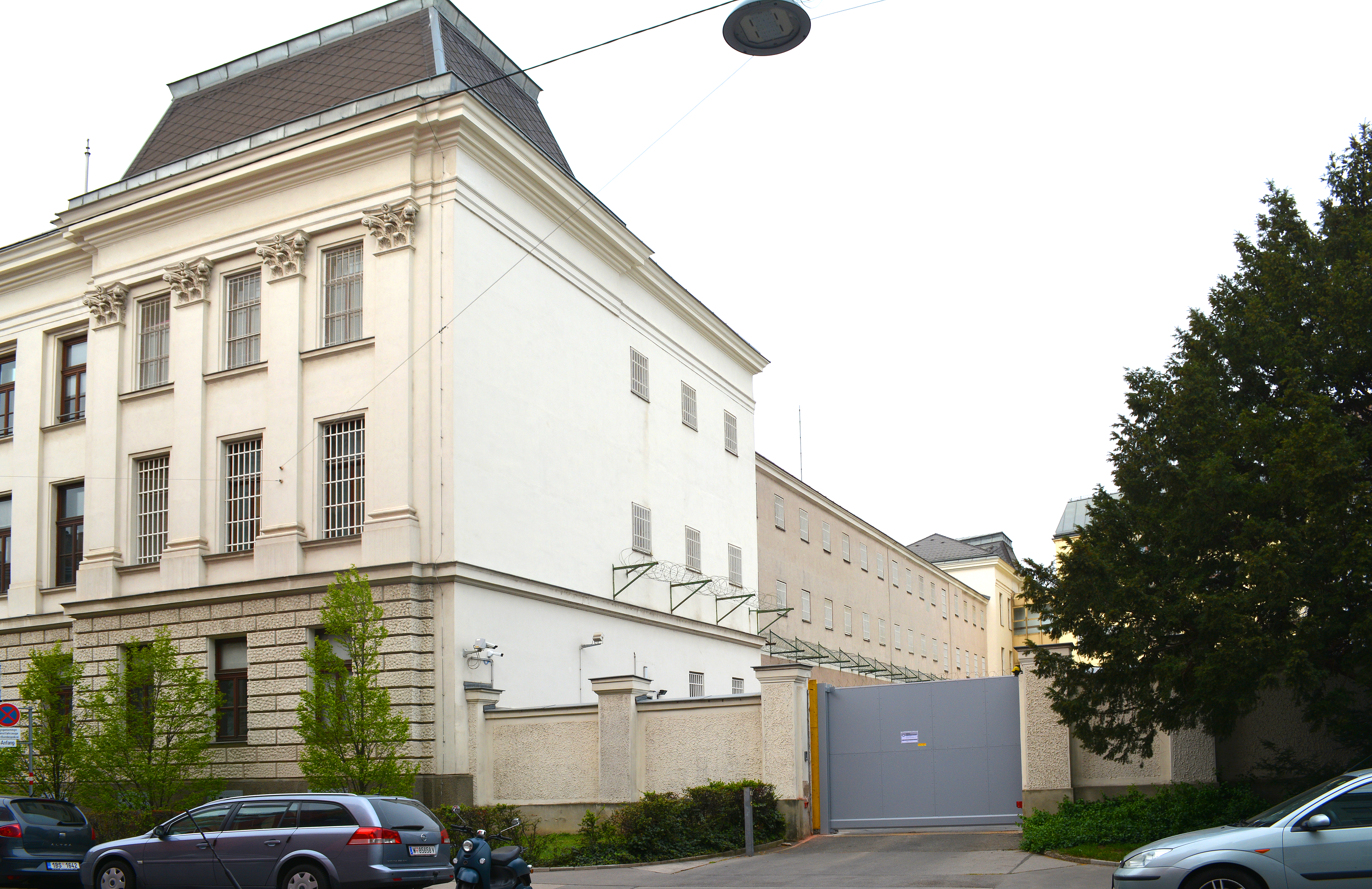 Justizanstalt Mittersteig – Außenstelle Floridsdorf, Wien 21. Bezirk